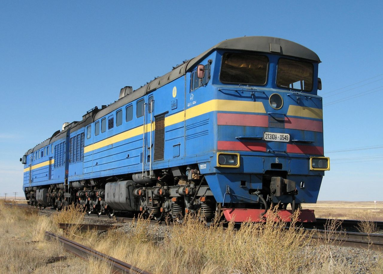 На секции Б установлена кабина от 2(3)ТЭ10М